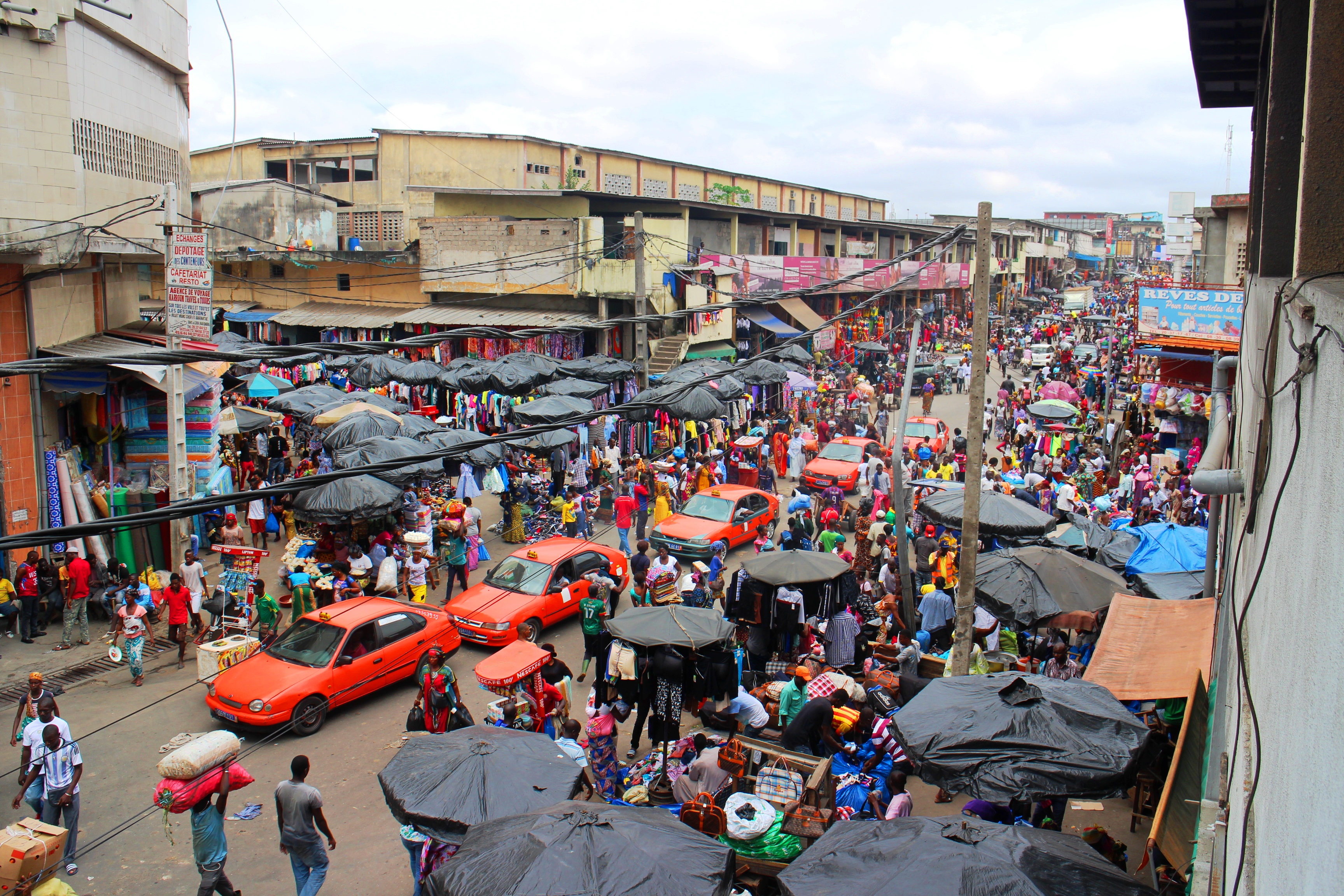 vue du marché d'adjamé à abidjan